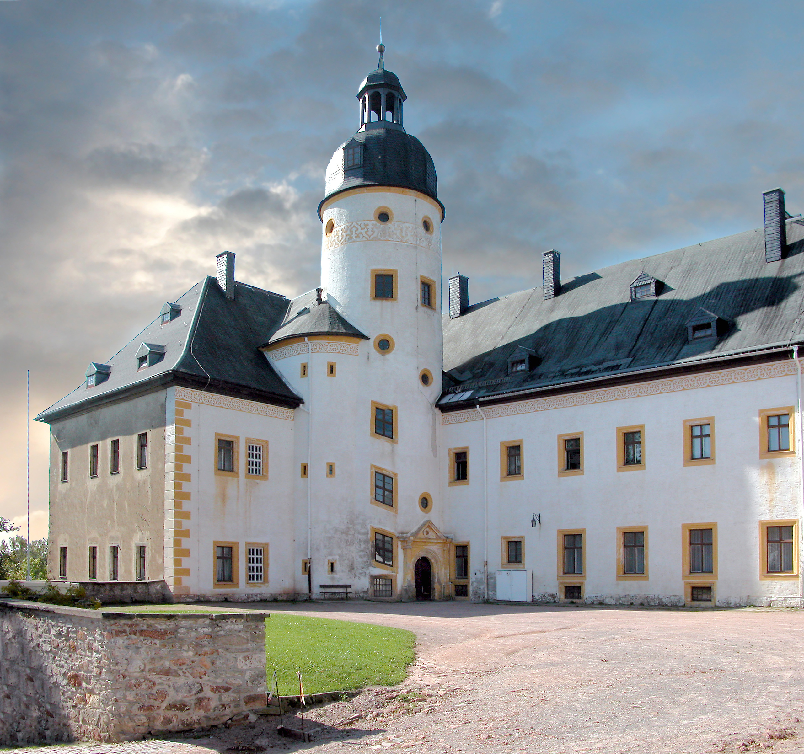 25.09.2006 09623 Frauenstein: Schloß (GMP: 50.803598,13.538838). Oberer Hof, Sicht von Nordosten. Renaissance (1585-1588 von H. Irmisch). Im 17. und 18. Jh. beschädigt. Heute Gottfried-Silbermann-Museum. [DSCN11802-11803.TIF]20060925275MDR.JPG(c)Blobelt